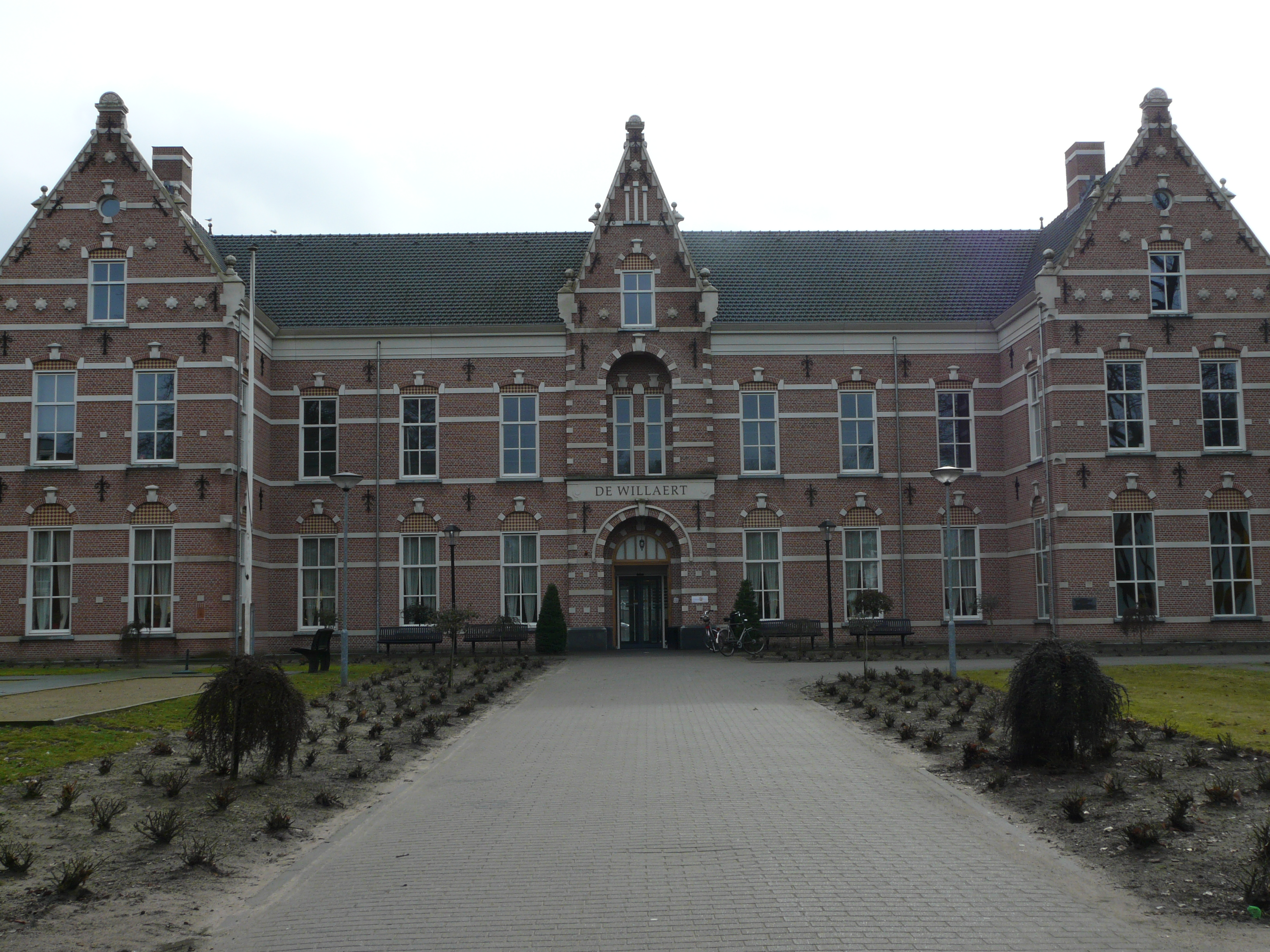 Verzorgingshuis De Willaert